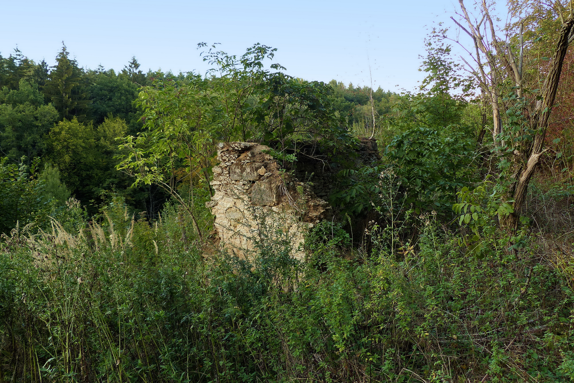 Trosky domu v bývalé Vazačce